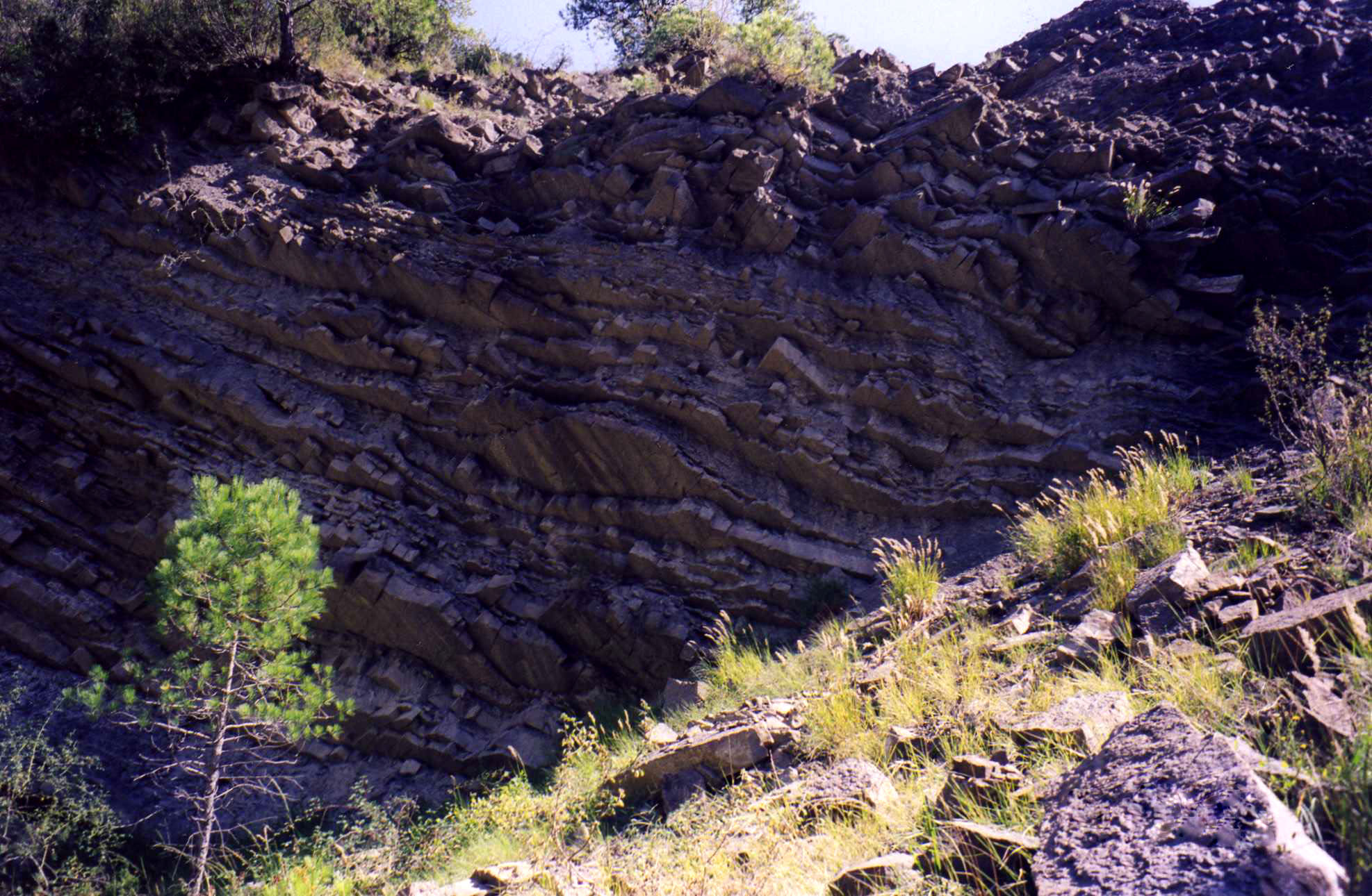 Aragonés: Lenera de flysch en o termino monecipal d'La Buerda.